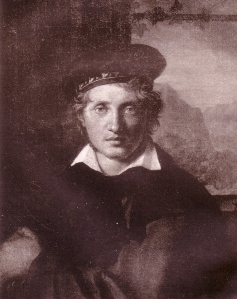 Georg Wilhelm Issel während seiner Studienjahre, gemalt von Peter Rittig